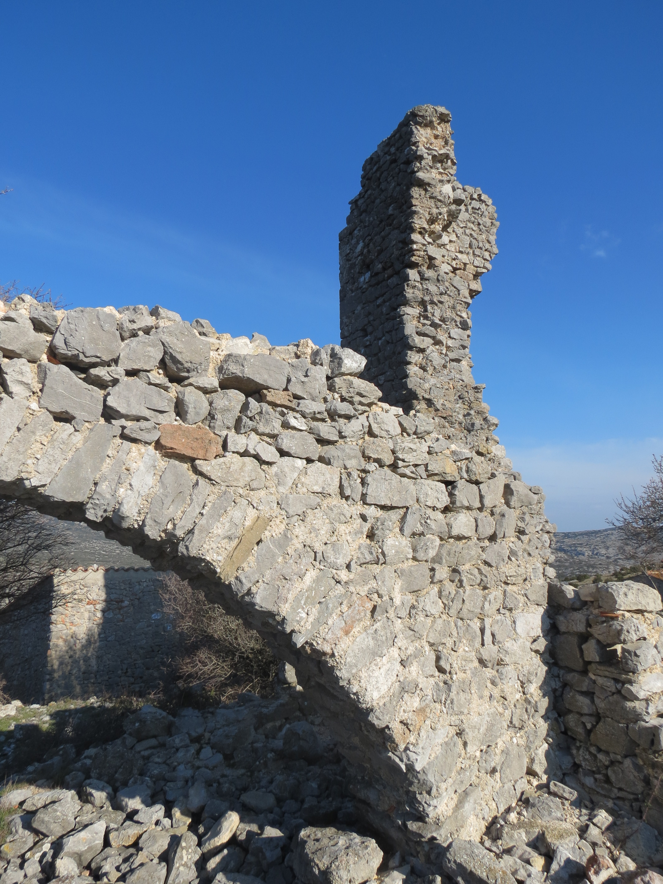 Hameau de Périllos, Opoul-Périllos, Pyrénée-Orientale, Languedoc-Roussillon, France. - Google Maps - Google Earth